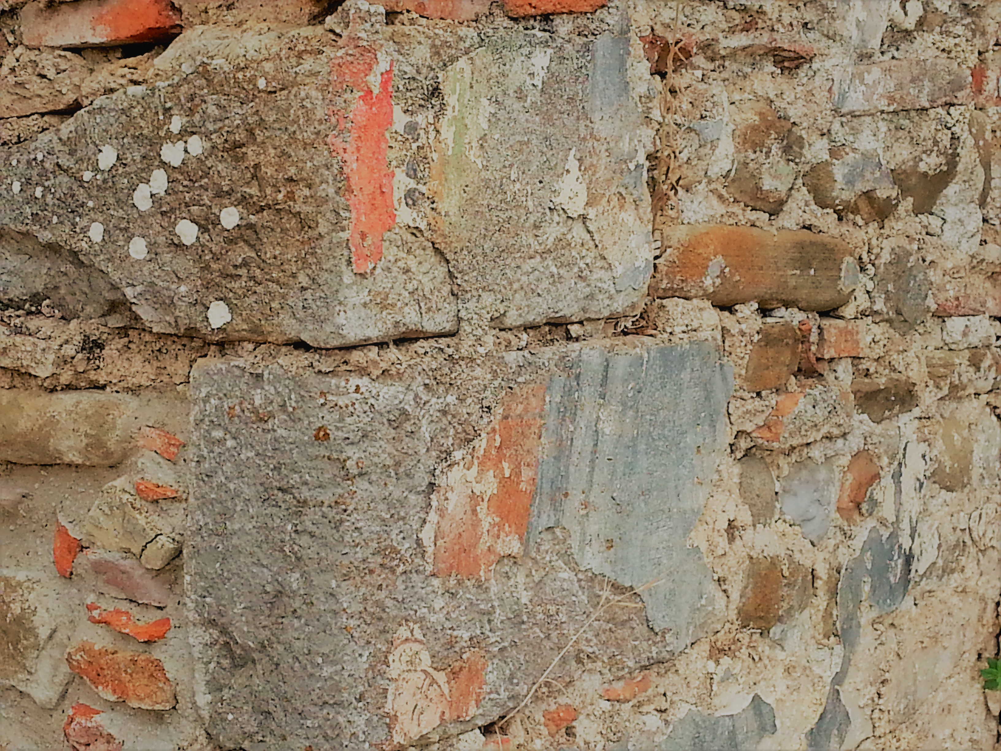 Grumentum. Santa Maria Assunta church. Remains of fresco in the central nave